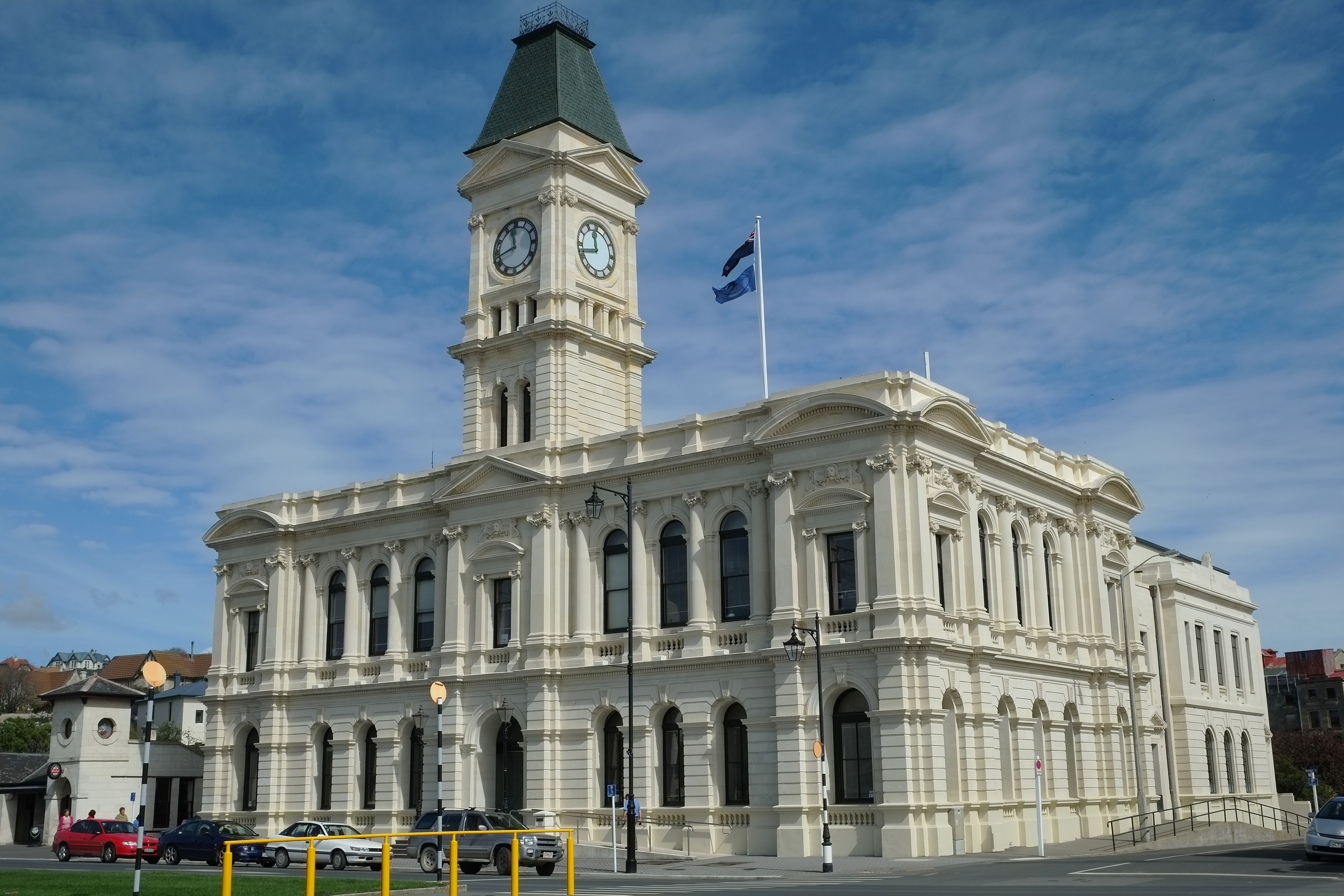 Oamaru Post Office (former)